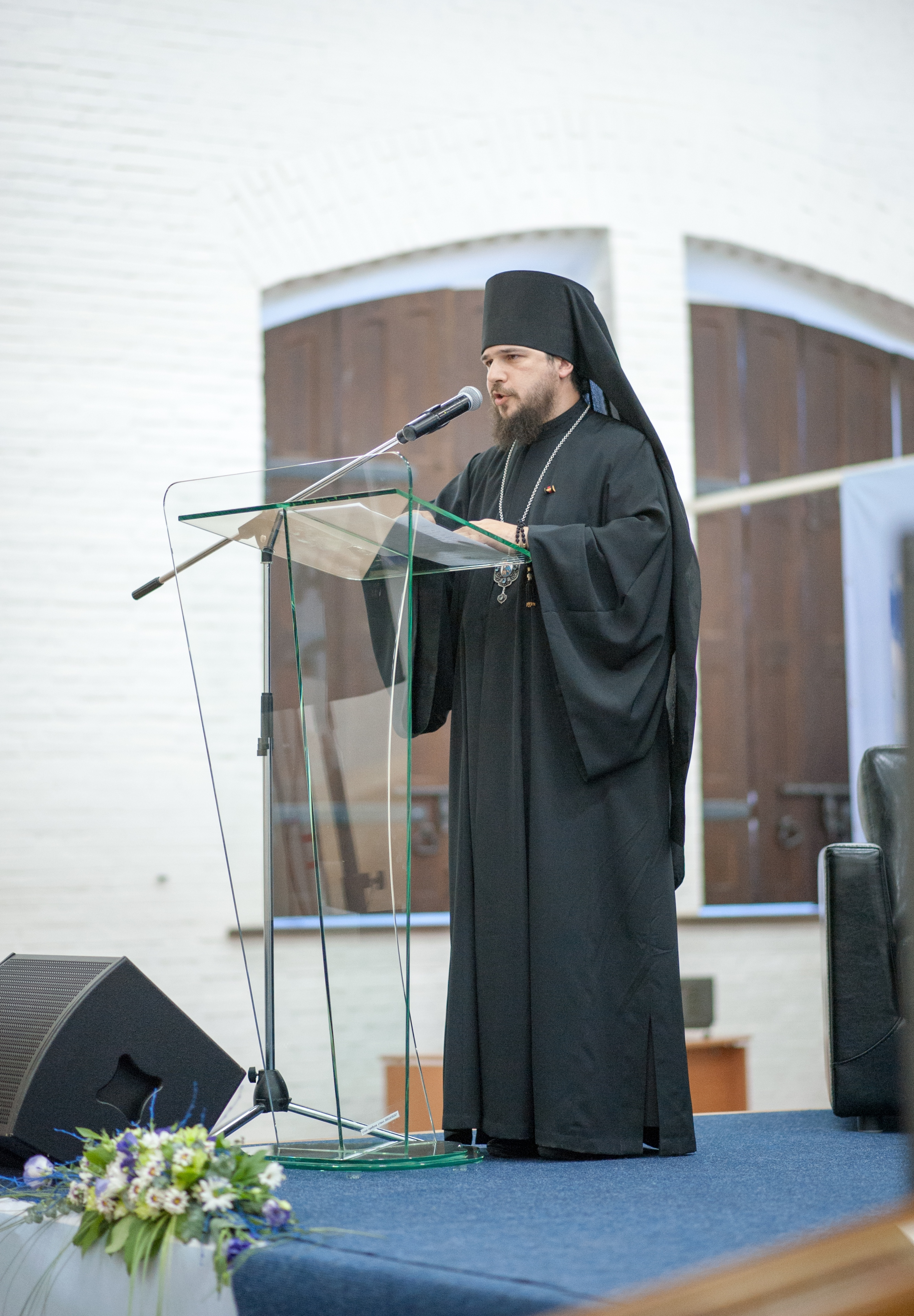 Владыка выступает на Астраханском православном народном форуме. 21 сентября 2015 года, "Цейхгауз" астраханского кремля.